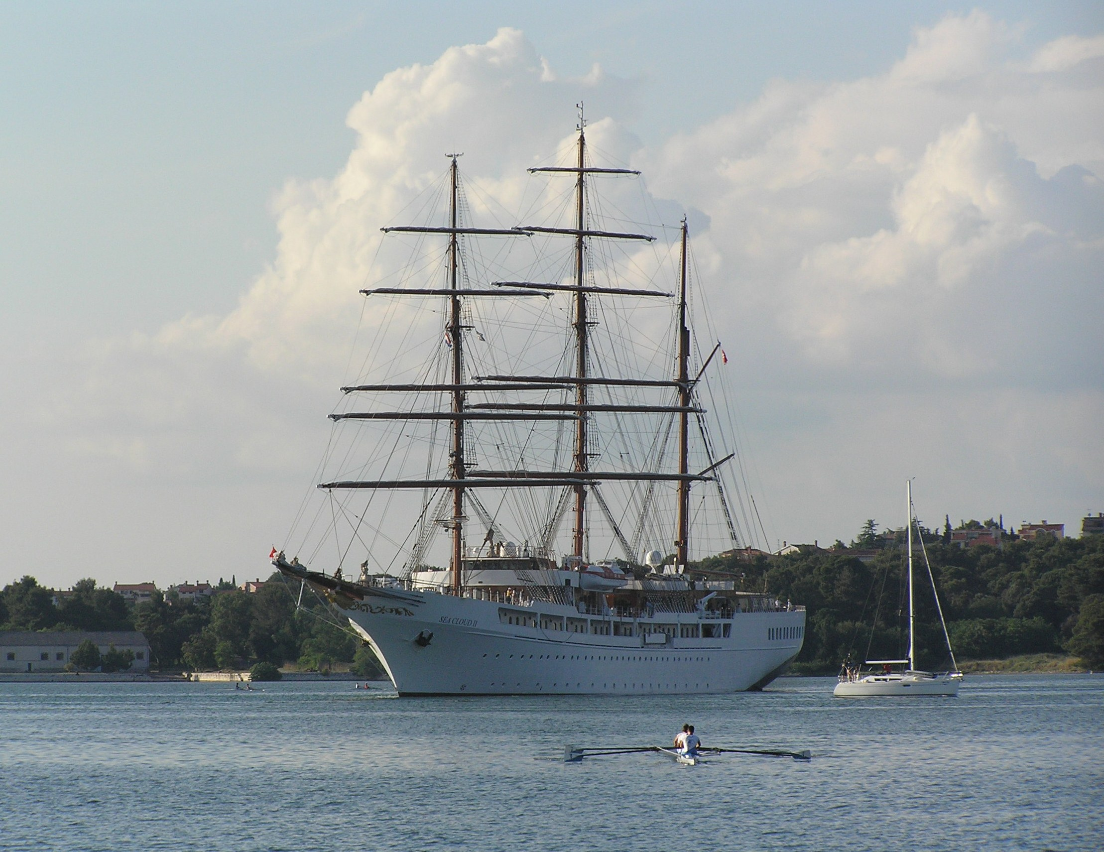 Sea Cloud II u Puli